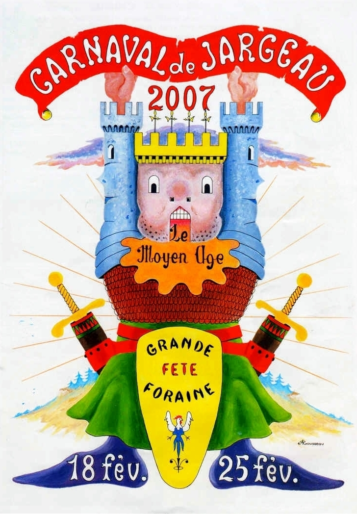 affiche du carnaval de Jargeau 2007 (Loiret, France). Thème : Le Moyen-Age